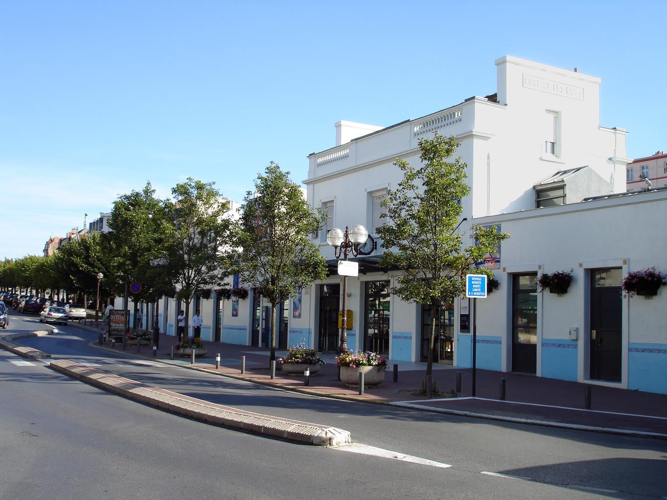 Façade de la gare d'Enghien-les-Bains (Val-d'Oise), France Juillet 2007 Photo personnelle (own work) de Clicsouris